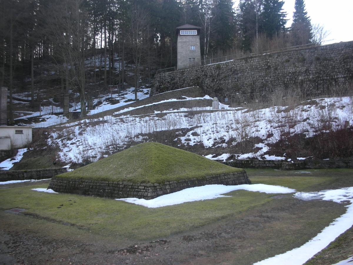 KZ Flossenbürg, Aschehügel neben dem Krematorium